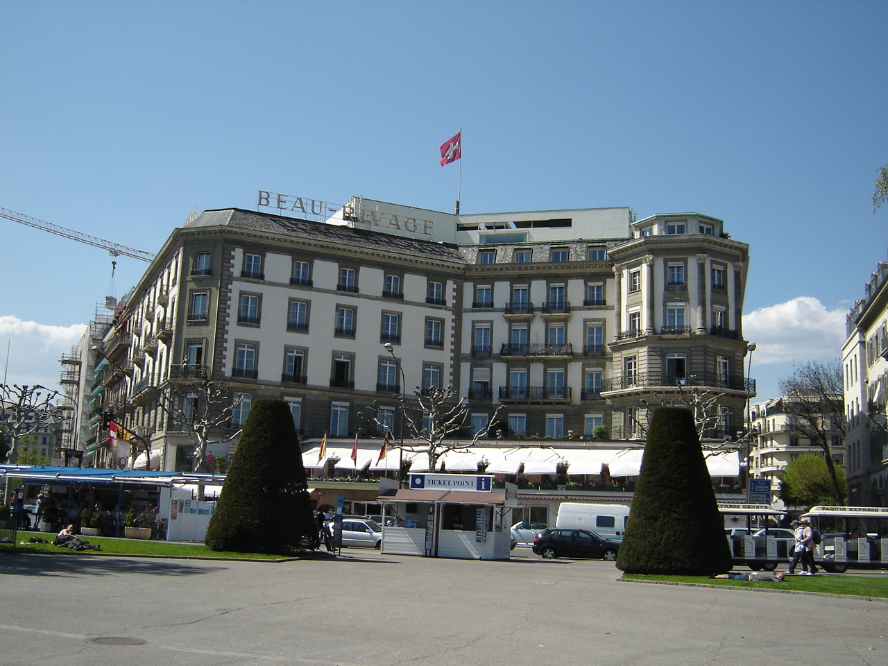 Hotel Beau Rivage in Geneva